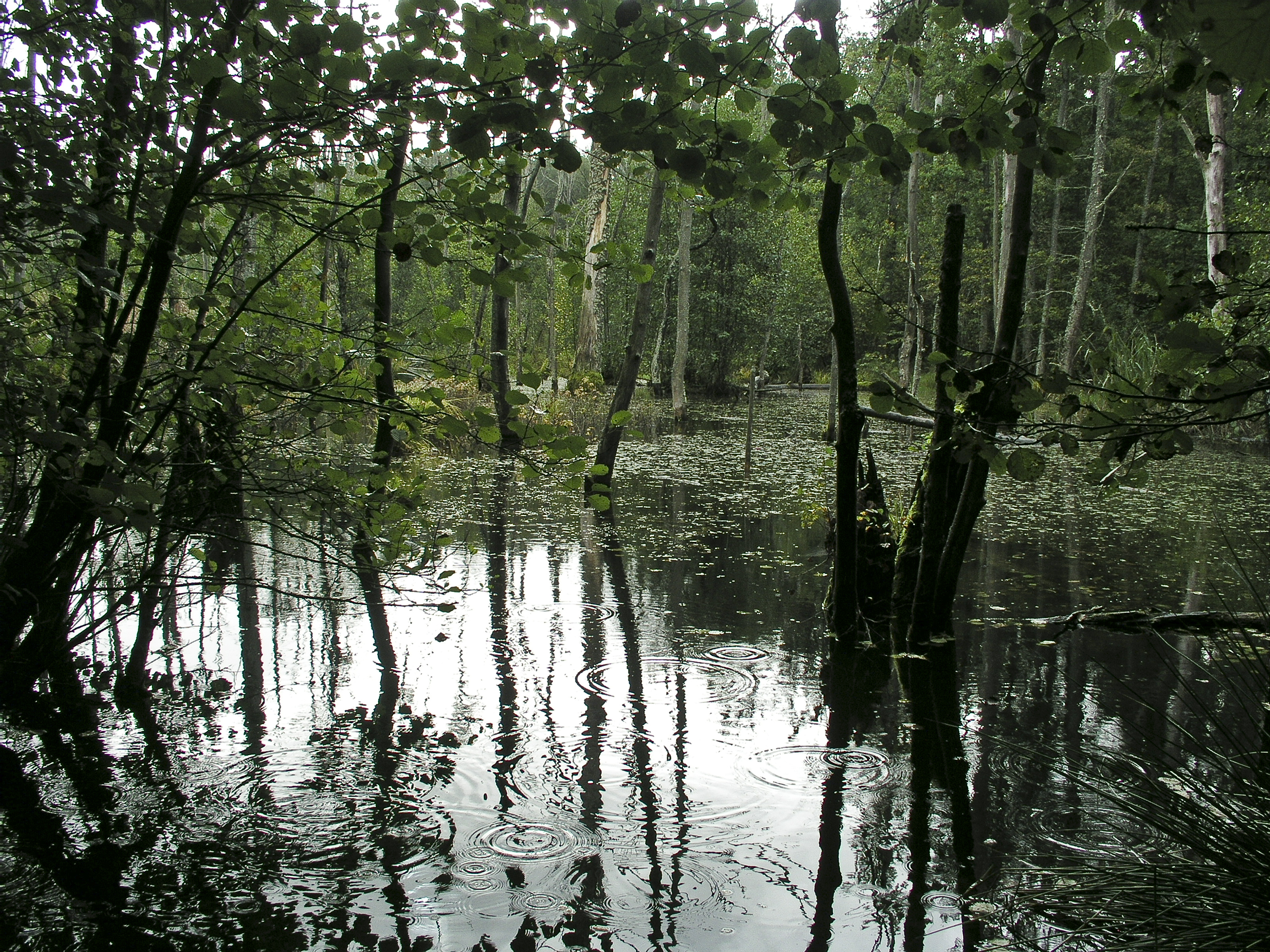 Kärna mosse naturreservat, källdammen. Malmslätt, Linköping, Sverige.